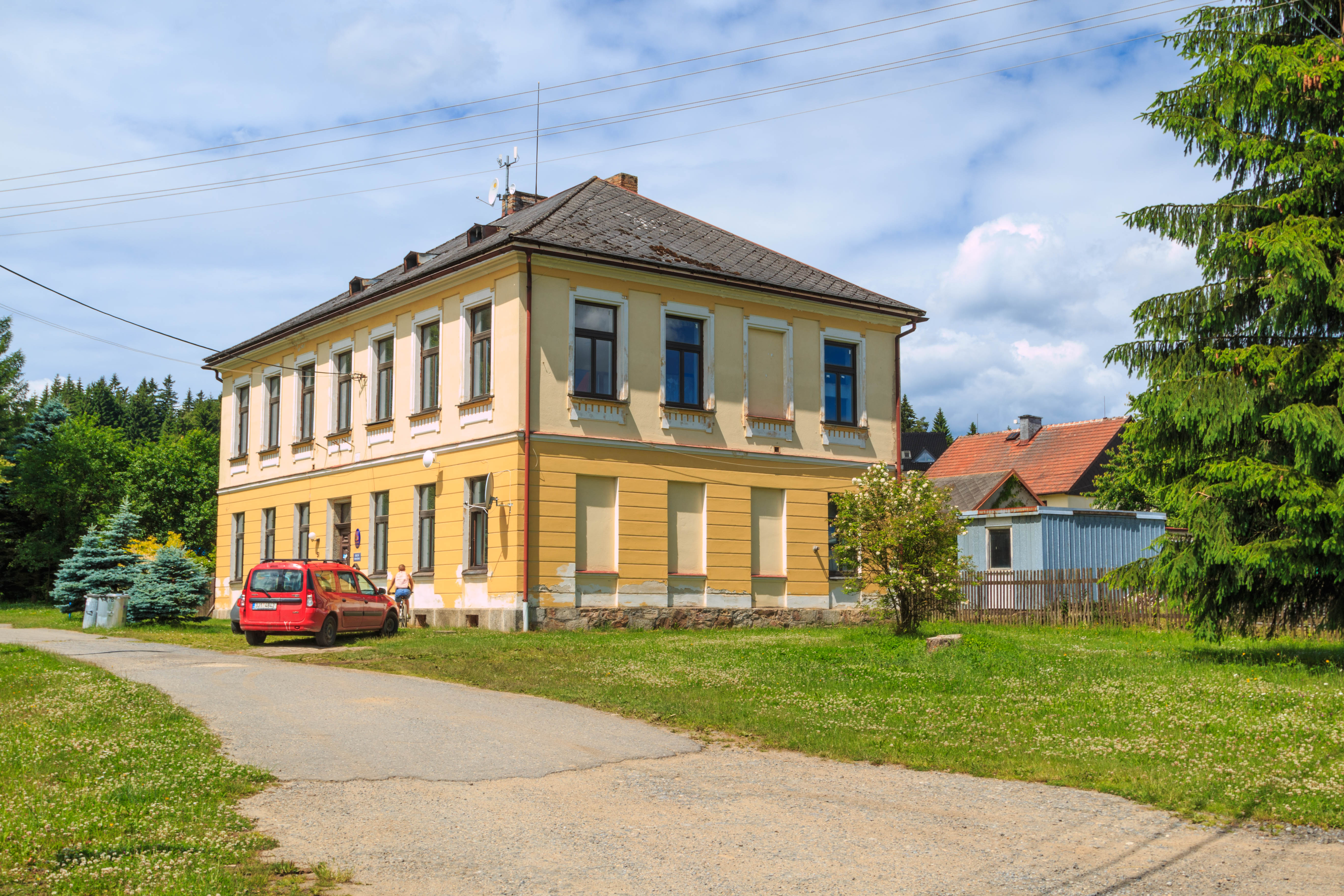 Kadov obecní úřad